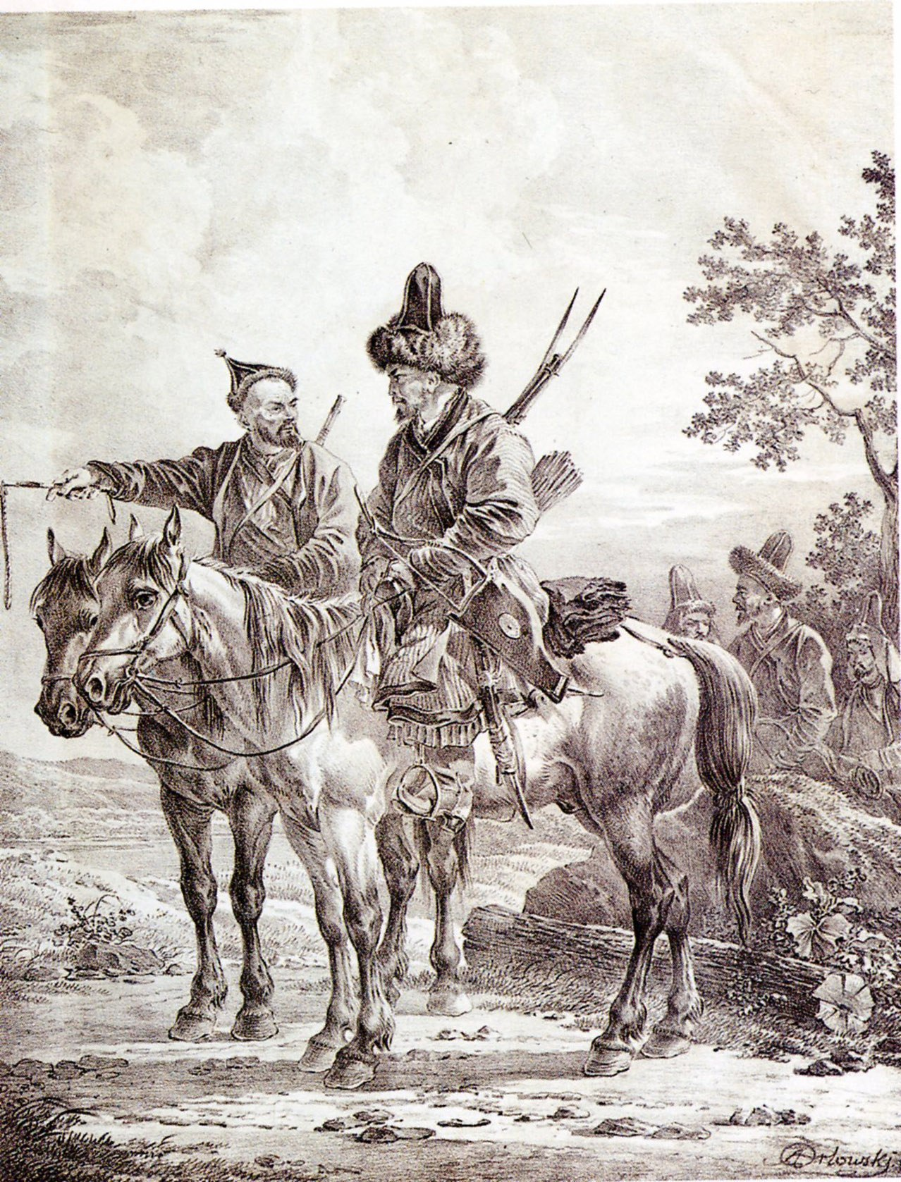 Башкирские воины